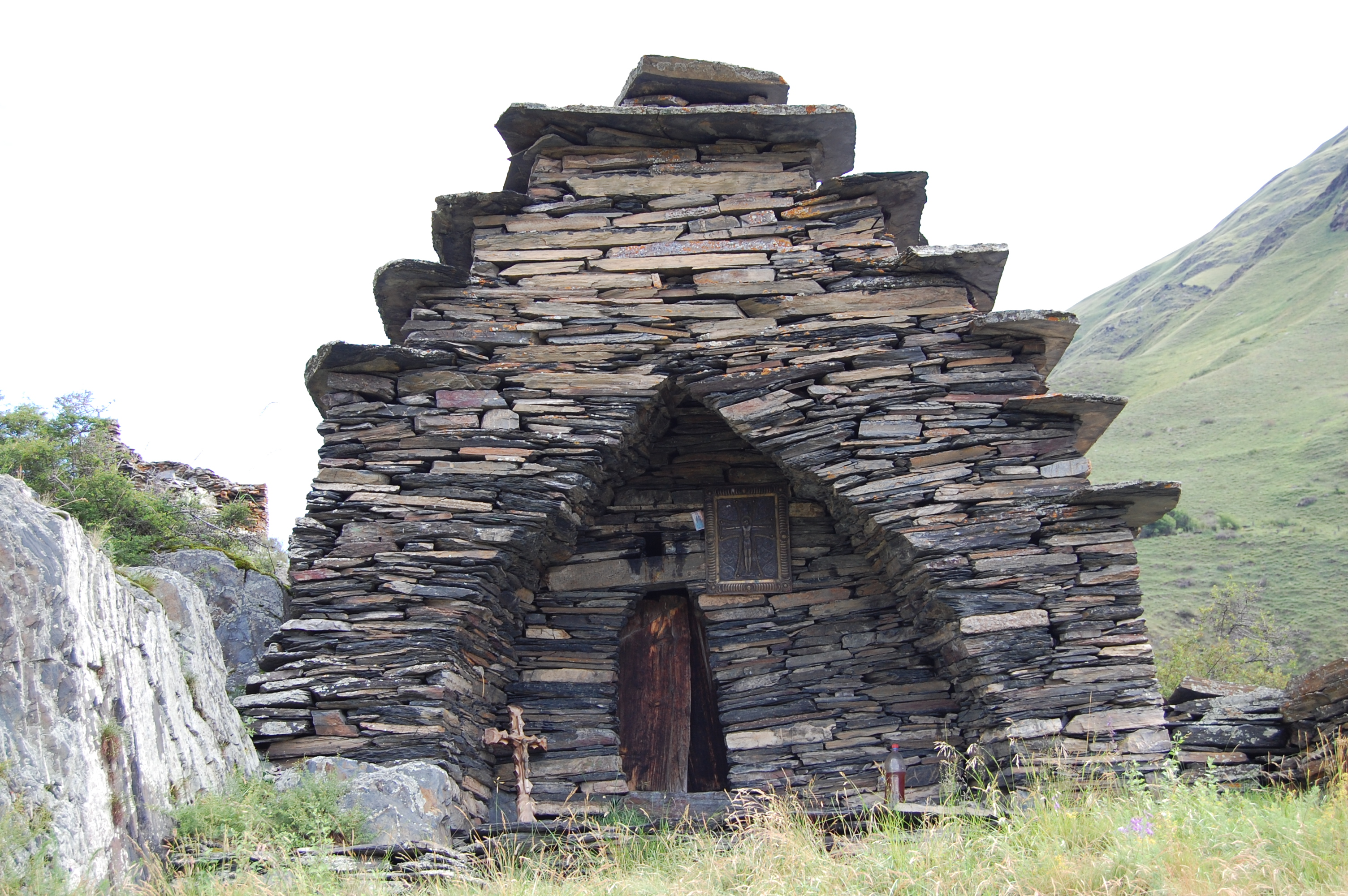 Mutso Georgia - Sakartvelo